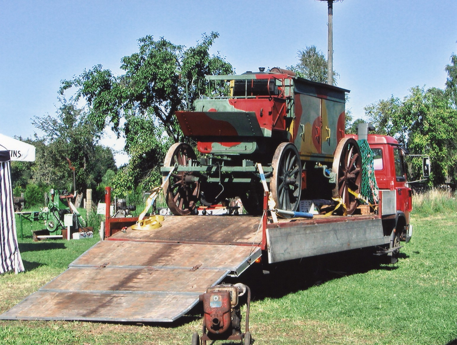 Ortsteil Wandlitz der Gemeinde Wandlitz, Agrarmuseum – Vorbereitung zum Museumsfest 2005, alte Technik wird bereit gestellt